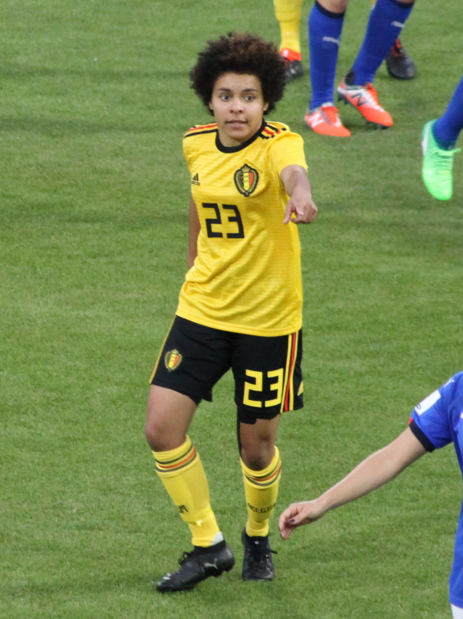 Kassandra Missipo, centrocampista della nazionale di calcio femminile del Belgio, durante l'incontro Italia-Belgio del 10 aprile 2018 allo stadio Paolo Mazza di Ferrara.